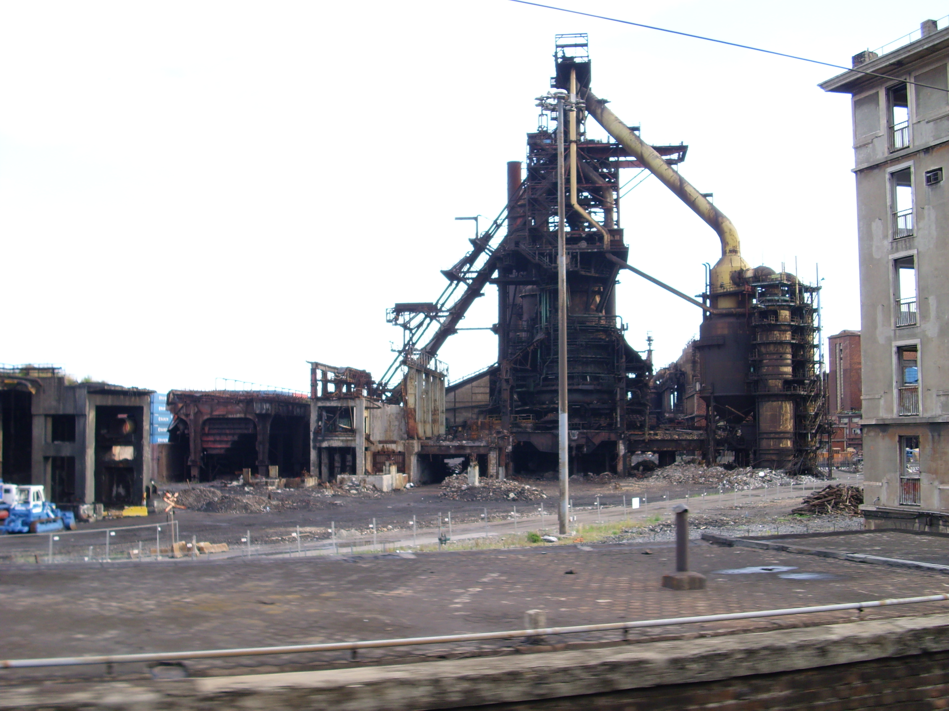 L'altoforno delle acciaierie di Cornigliano (Genova) in demolizione